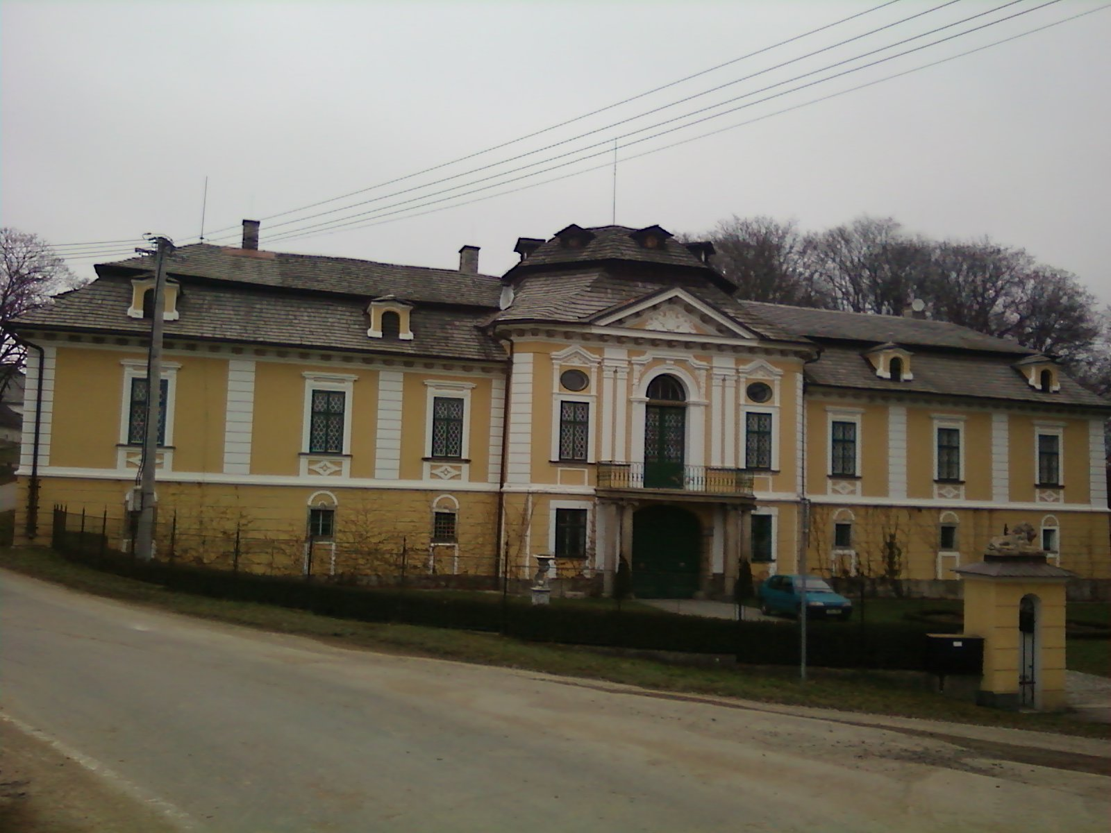 Zámek Úsobí (stav v roce 2012)